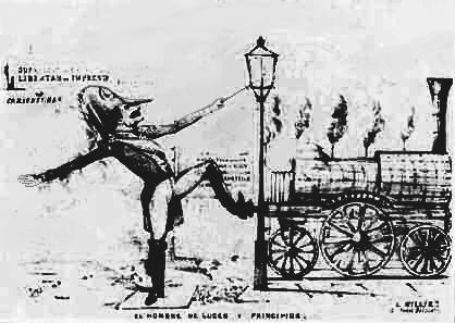 Caricatura de Ramón Castilla y el Ferrocarril Rocket, el primero en el Perú.